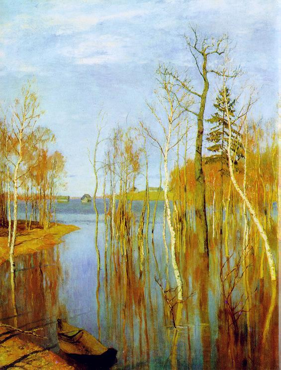 Spring flood